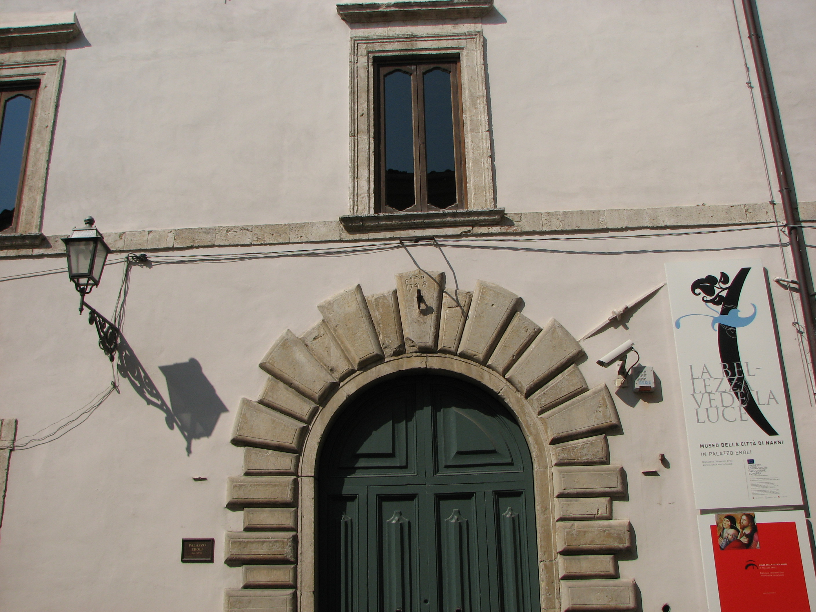 Museo Eroli ingresso